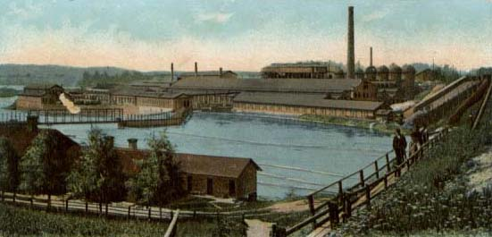 Domnarfvets jernverk. Kolorerat vykort från omkr. år 1900.